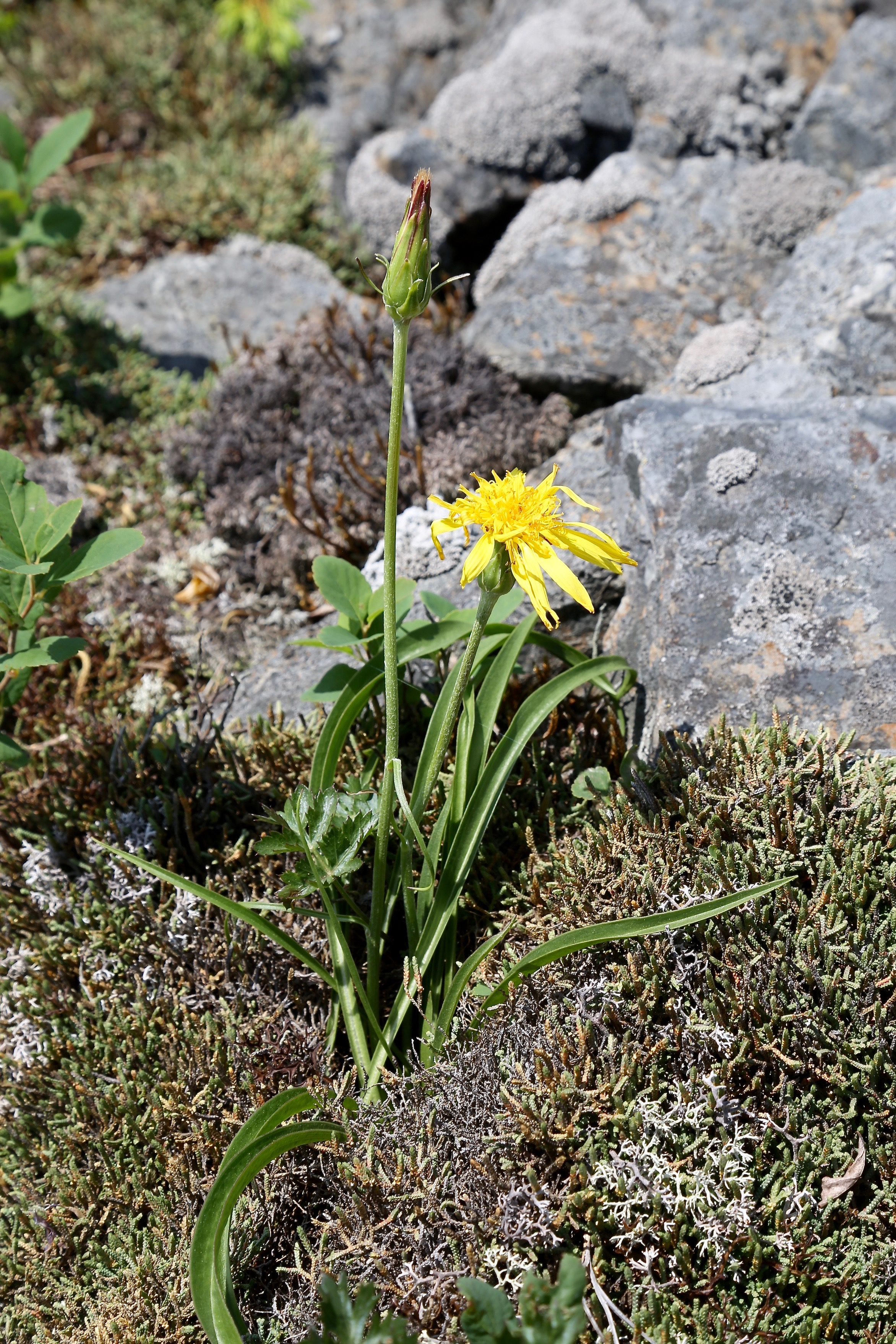 Komsomolsk Nature Reserve (Khabarovsk Krai, Russian Far East), Mt. Chokkety, 600 m